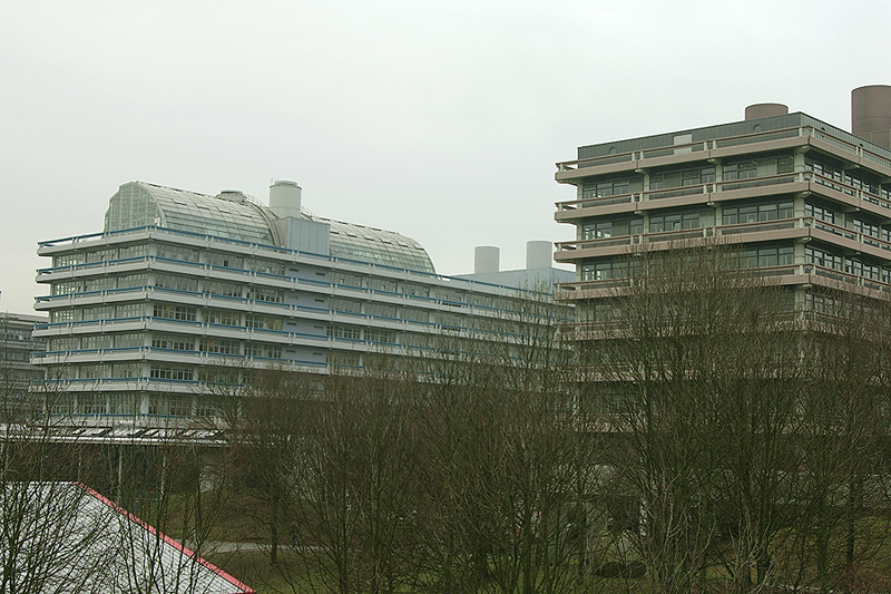 Ruhr-Universität Bochum, GA-Gebäude